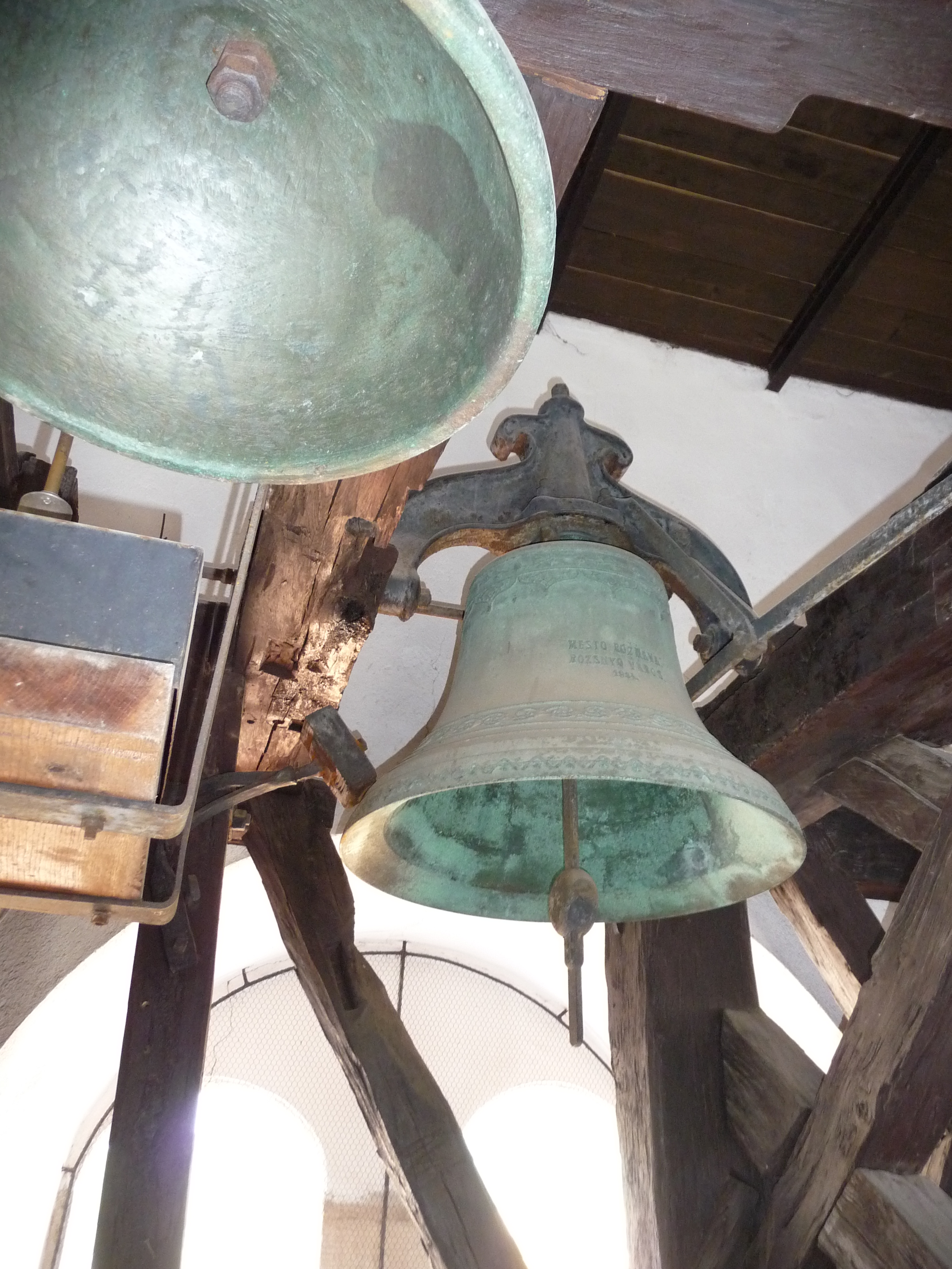 Zvon má priemer cca 90 cm